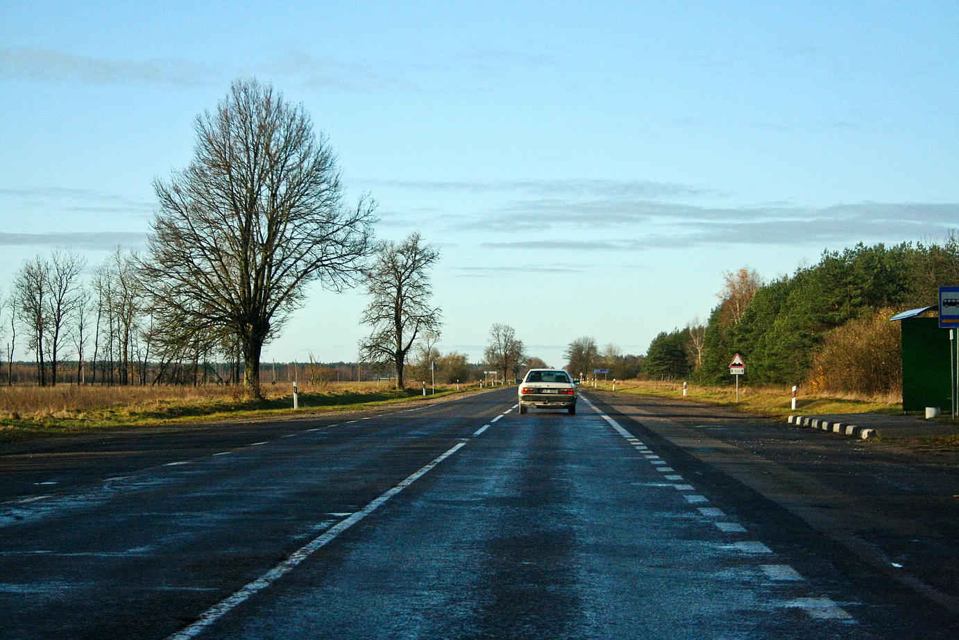 Aklasis Ežeras, Lithuania